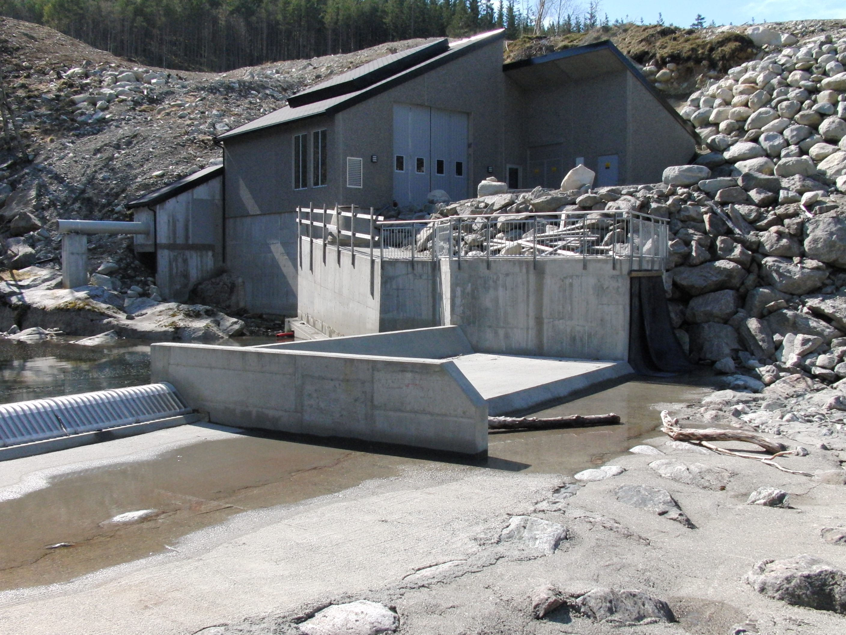 Seterkraft kraftverk